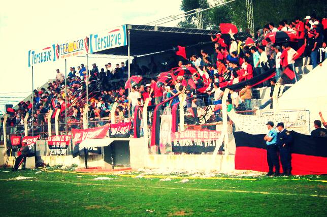 Tribuna colmada y con festejos.